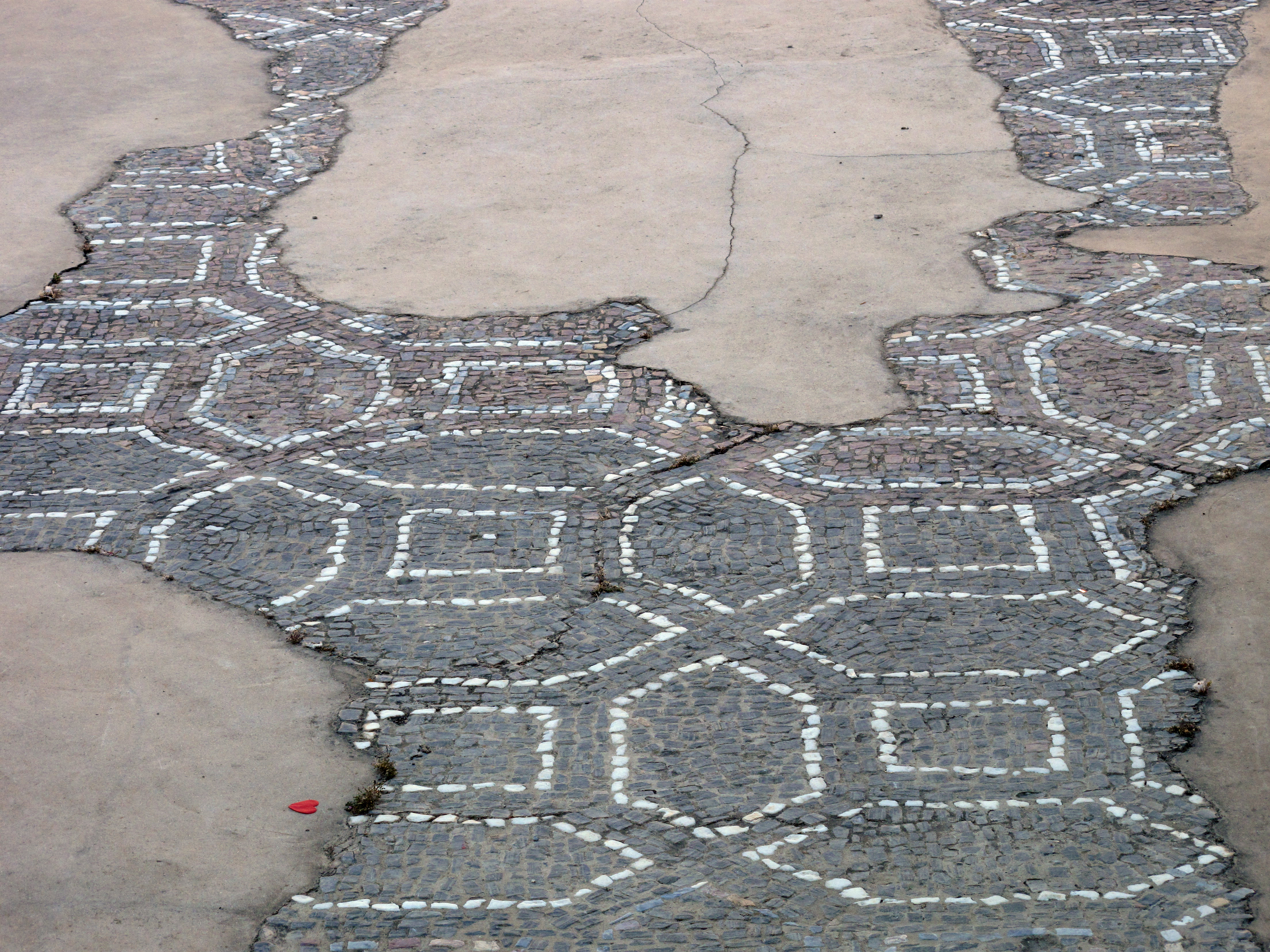 Santa Maria de Terrassa